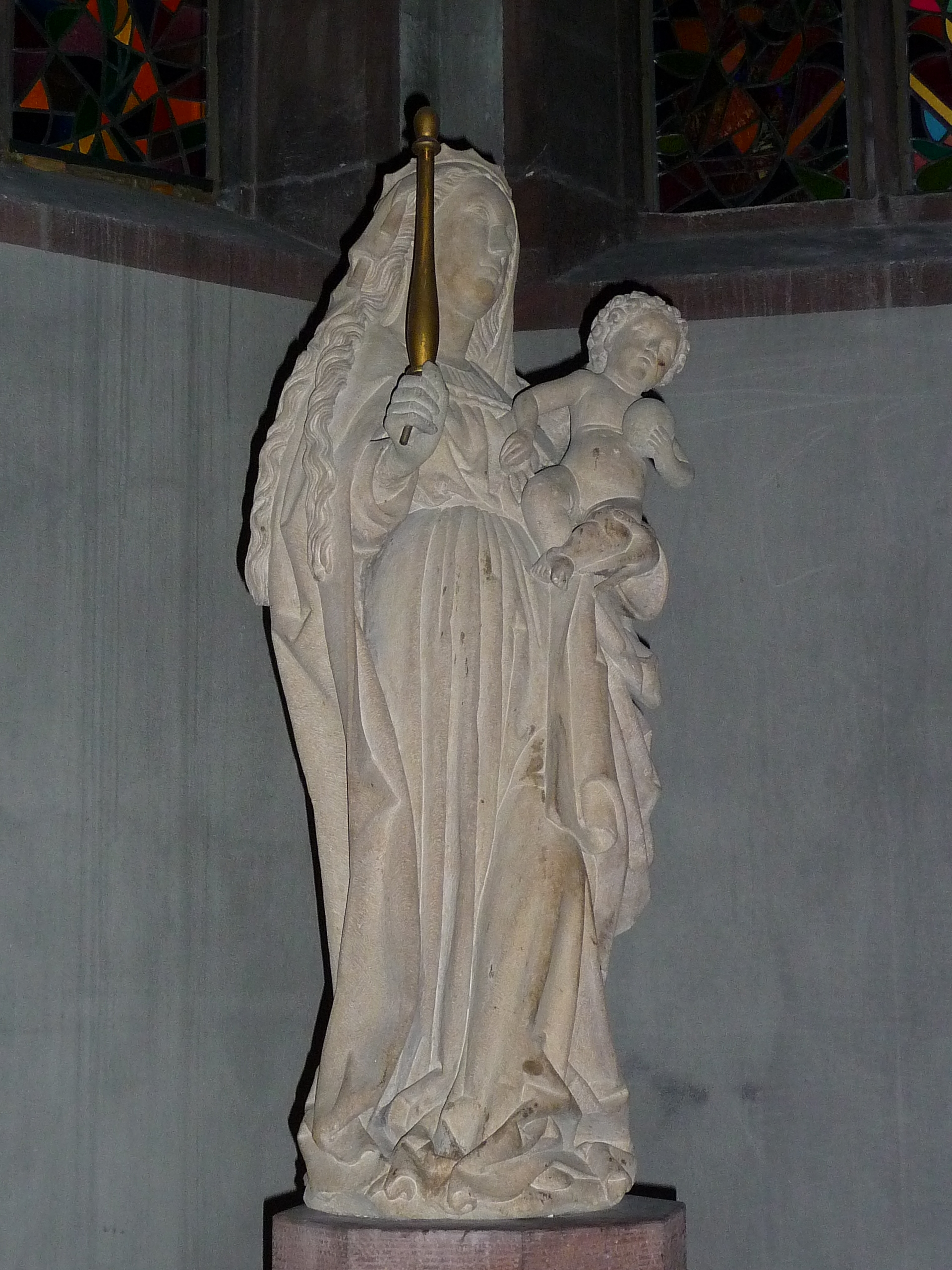 Madonna aus Sandstein, um 1500, Größe: 1,05 Meter (Zustand nach Restaurierung 1987), aufgestellt in der Stiftskirche in Baden-Baden (Baden-Württemberg, Deutschland)